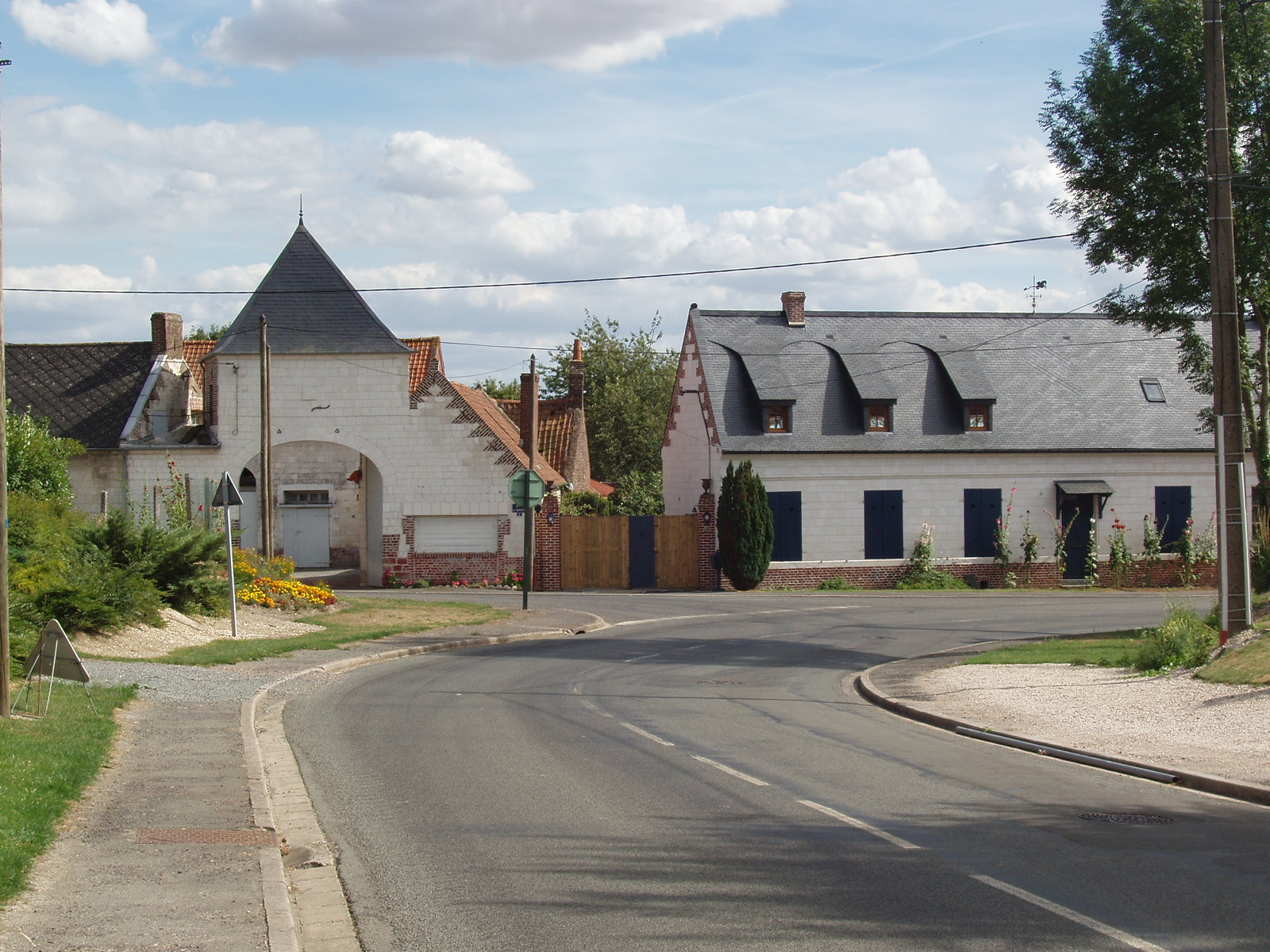 Commune française de Tilloy-lès-Hermaville dans le département du Pas-de-Calais en France - Carrefour principal